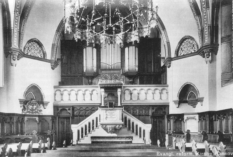 Hannover, evangelisch-reformierte Kirche, Innenraum vor der Kriegszerstörung